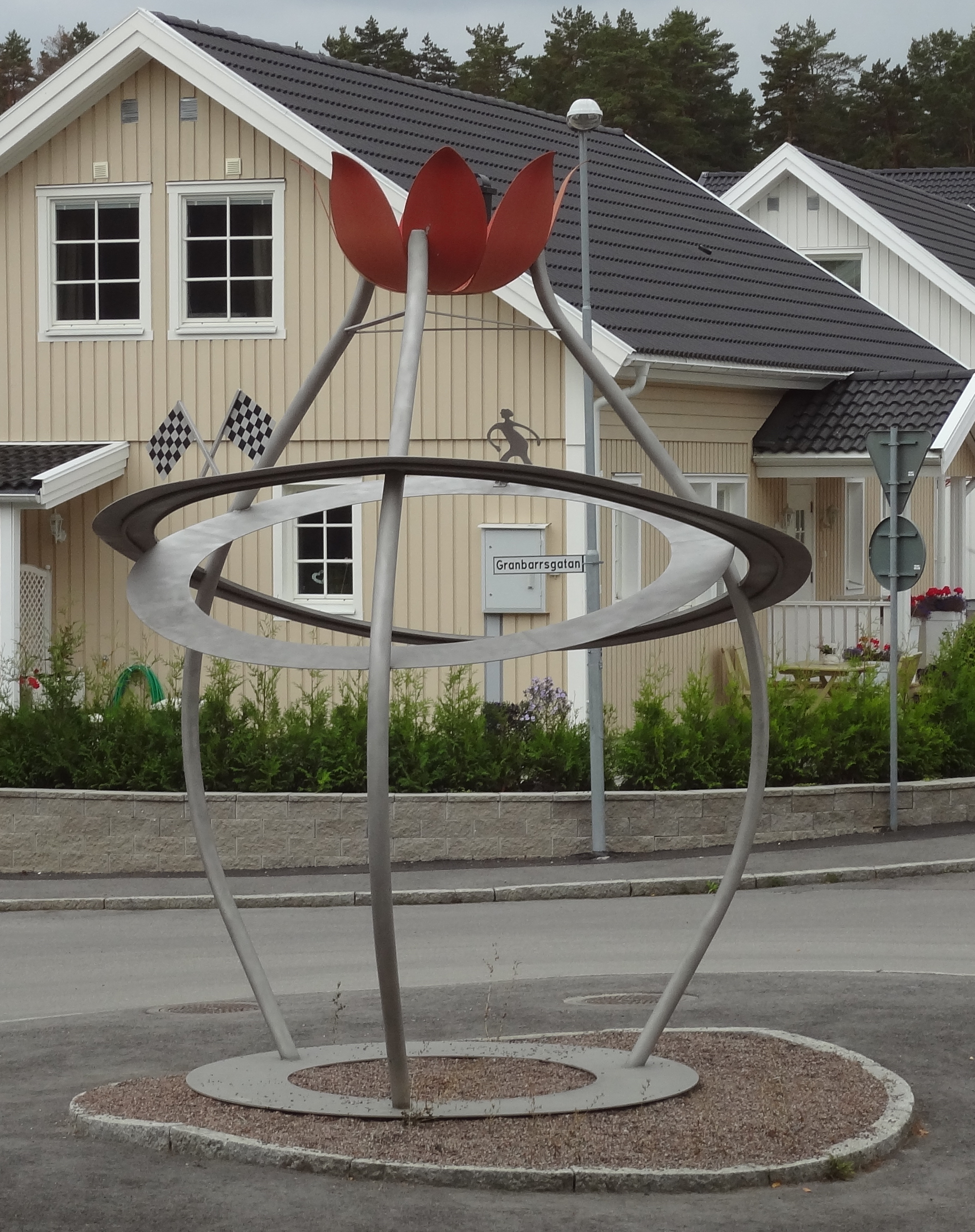 Konstverket "Speedway" av Bie Norling, bakom Tunavallen i Eskilstuna. Här låg tidigare en speedwaybana.